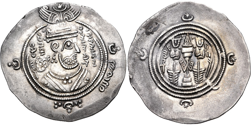 Dracma de estilo sassânida emitido pelo califa Moáuia I